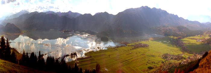 Cerkniško jezero, poplavljeno kraško polje